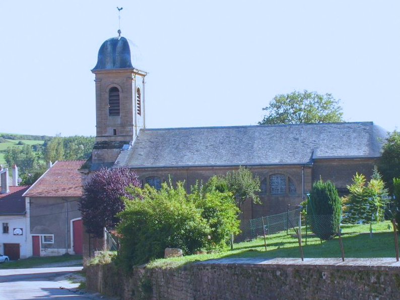 France - Département 55 (Meuse) Photo de l'église prise en septembre 2005 parF5ZV 15 décembre 2005 à 20:22 (CET) Licence GFDL Licensing Catégorie:Image de commune de la Meuse